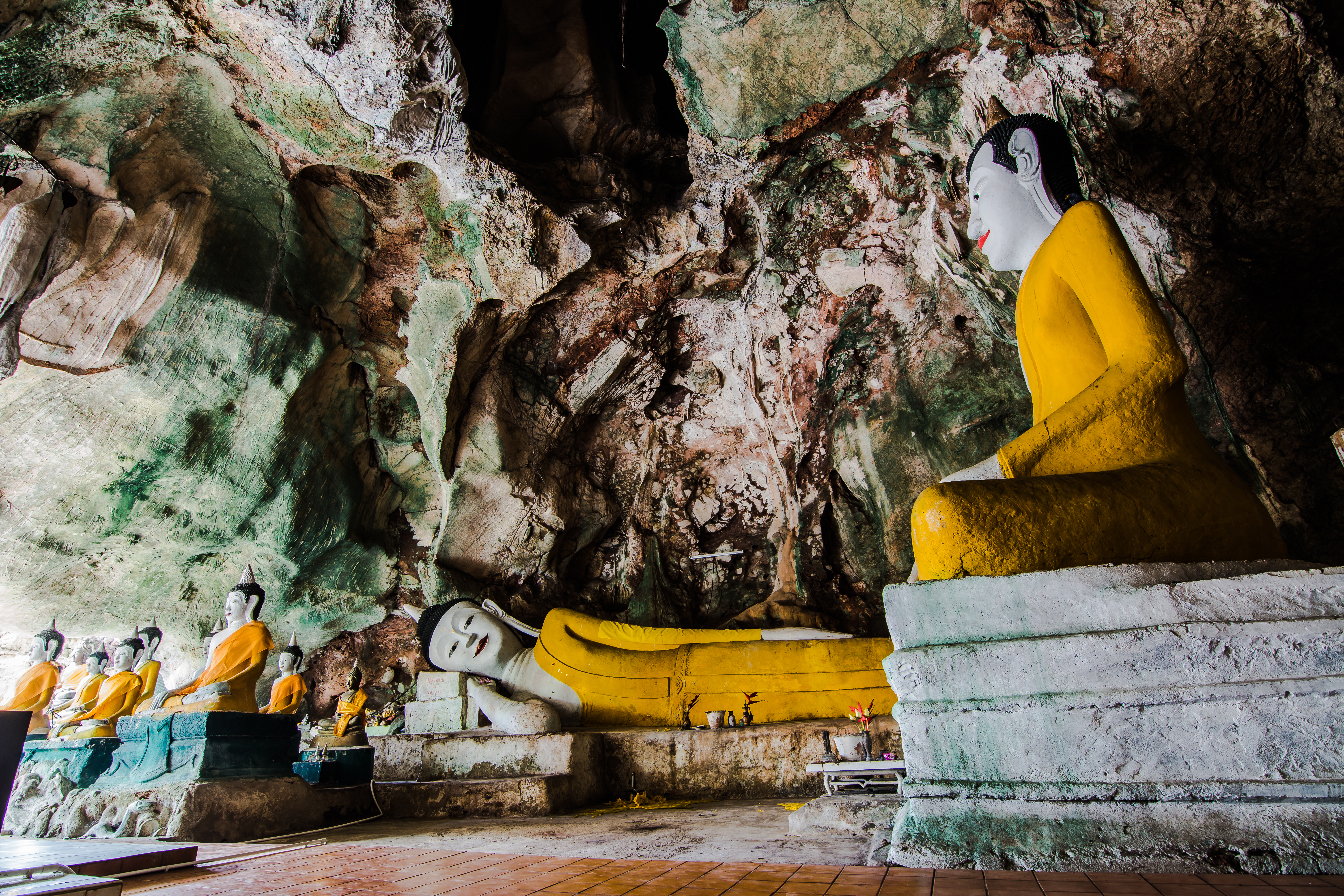 วัดถ้าคูหาสวรรค์สร้างในสมัยอยุธยา ต่อมาได้รับการยกฐานะเป็นพระอารามหลวงแห่งแรกในจังหวัดพัทลุง ภายในถ้ำมีพระพุทธรูปปางไสยาสน์องค์ใหญ่ และพระพุทธรูปนั่งประดิษฐานอยู่ตามผนังถ้ำ และบริเวณหน้าถ้ำมีจารึกพระปรมาภิไธยย่อของพระมหากษัตริย์ และเชื้อพระวงศ์หลายพระองค์ ปรากฎอยู่